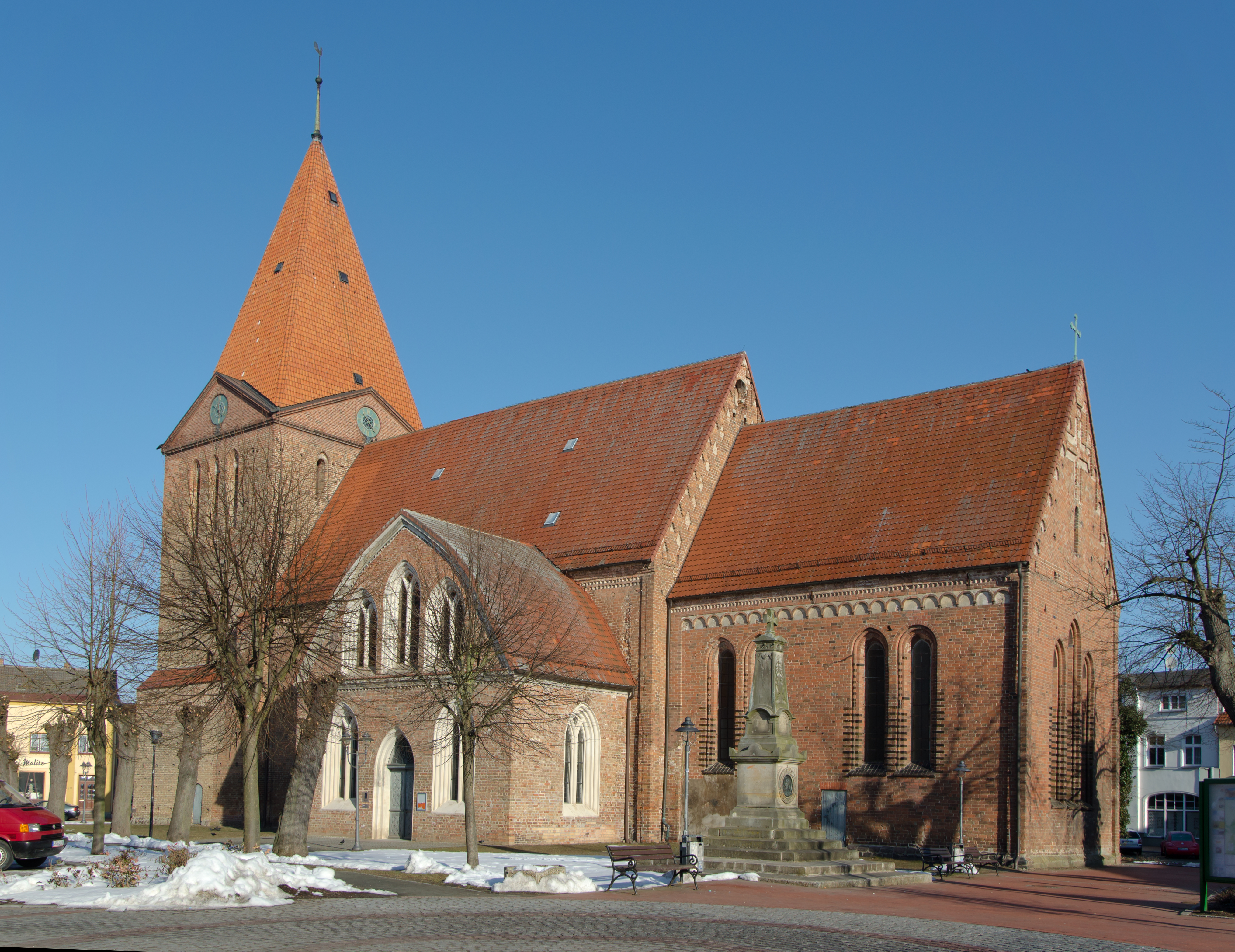 St Paul Schwaan